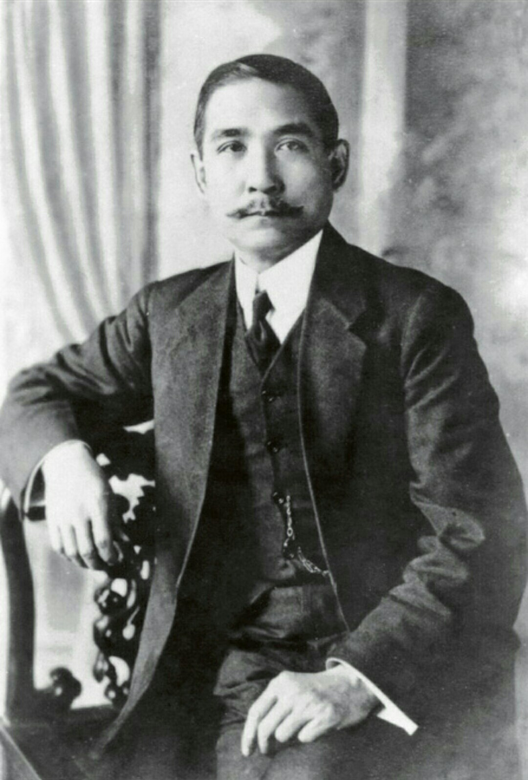 中文（台灣）: 孫中山先生